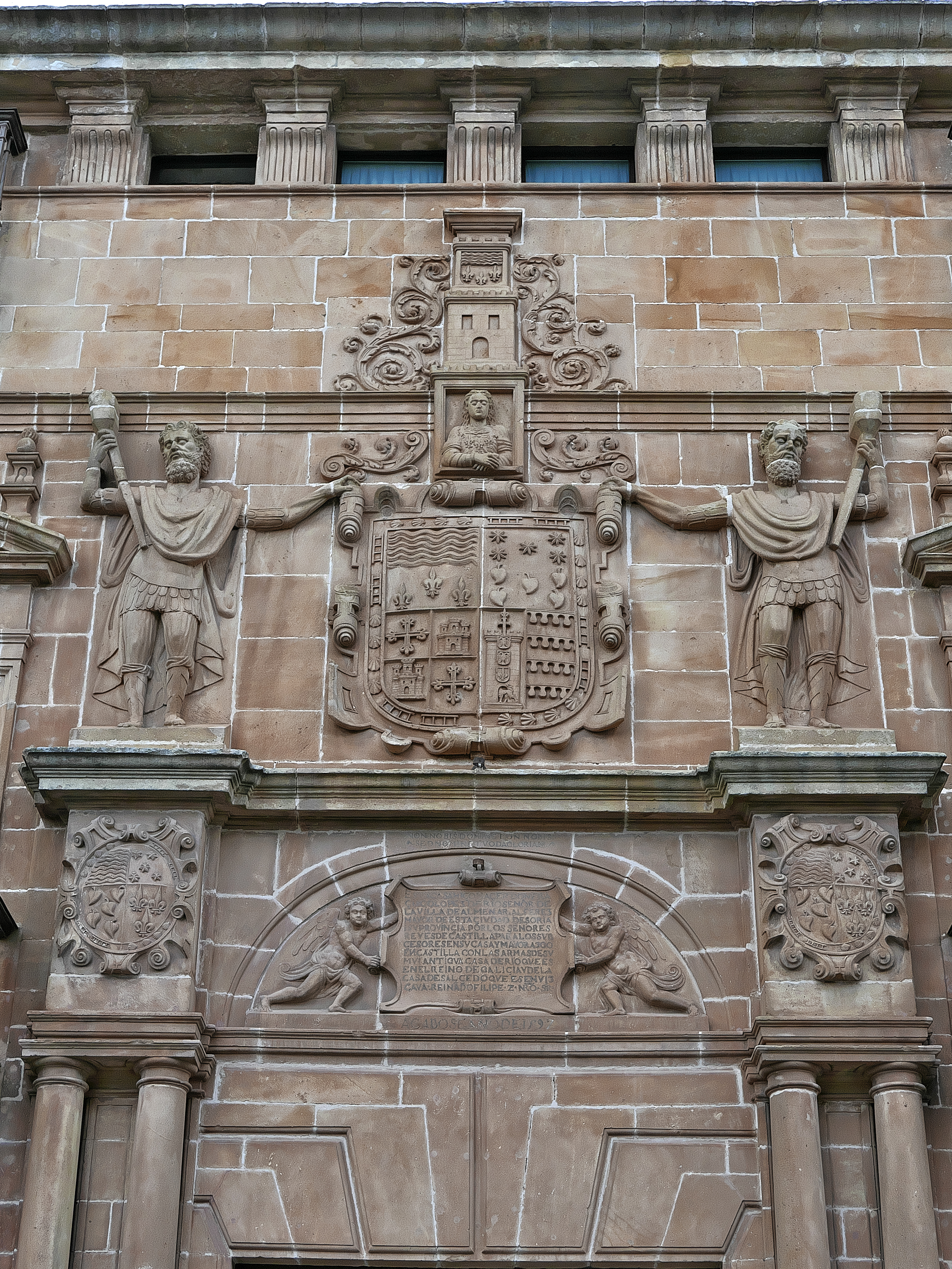 Portada del palacio de Francisco López de Río (1592)